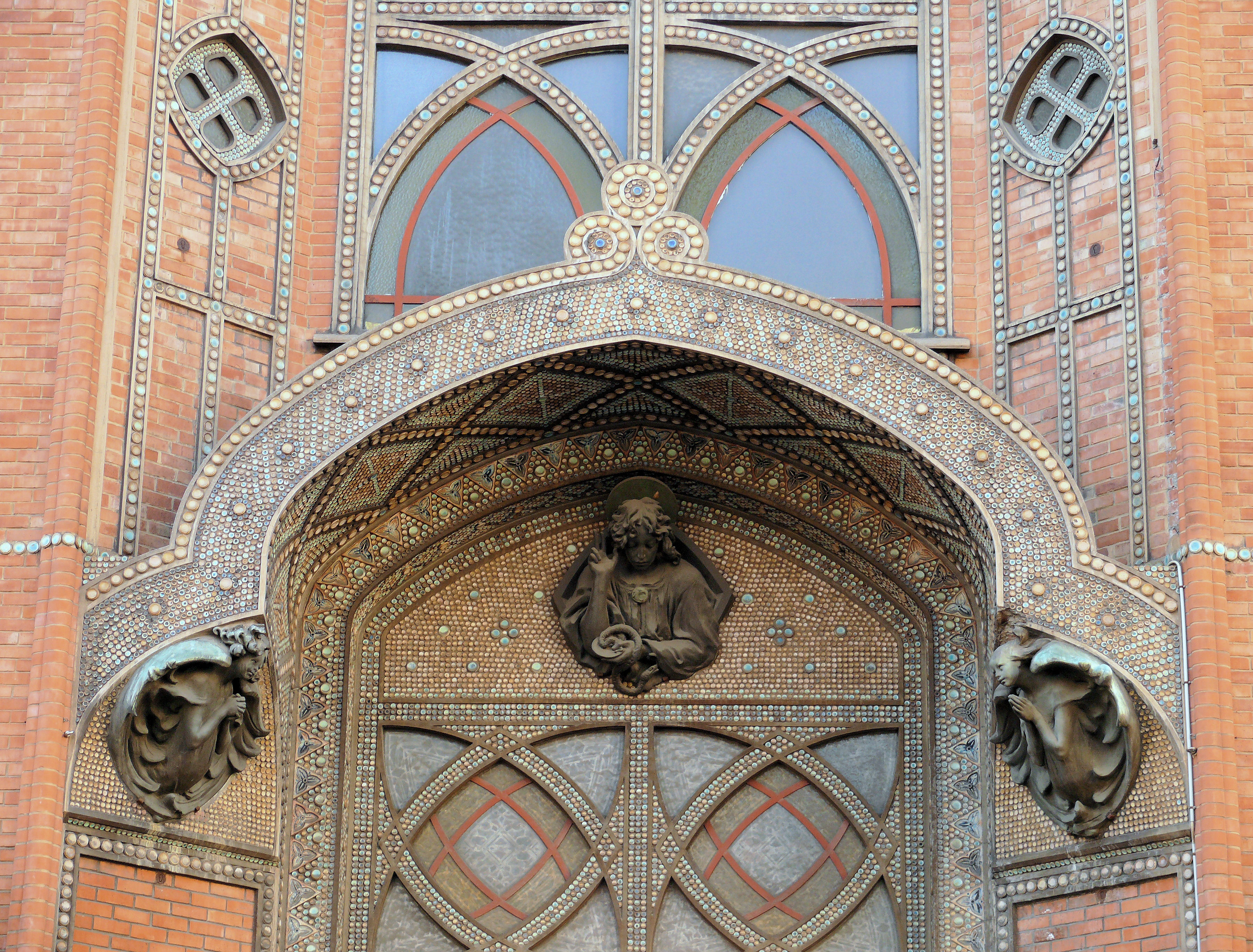 Paris 18e arrondissement - Eglise Saint-Jean-de-Montmartre - Décoration de la façade